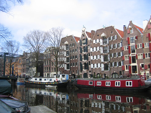 De Amsterdamse Brouwersgracht in februari 2006. Eigen foto